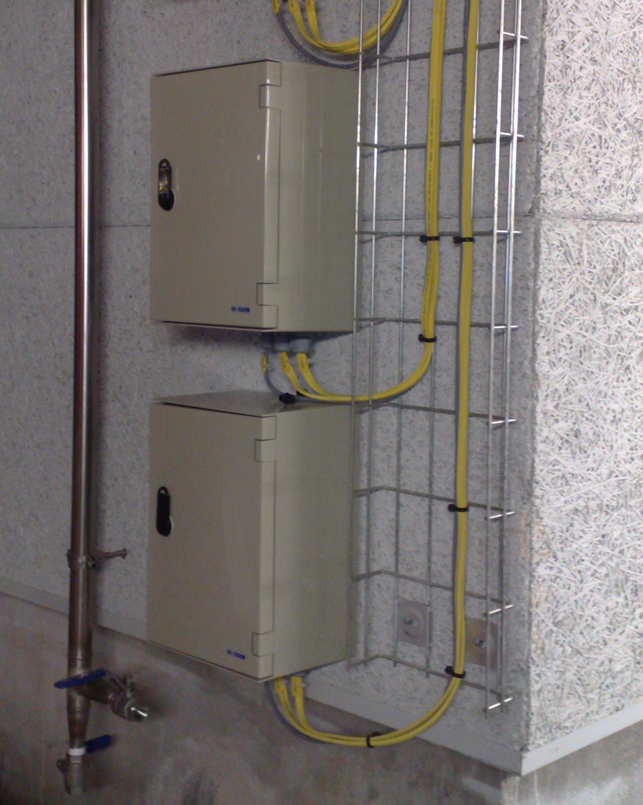 Coffrets de boucle ASi. Les conducteurs gainés en jaune partent vers la boucle industrielle sur laquelle sont raccordés des capteurs. Le câble gainé gris effectue la liaison avec un automate.